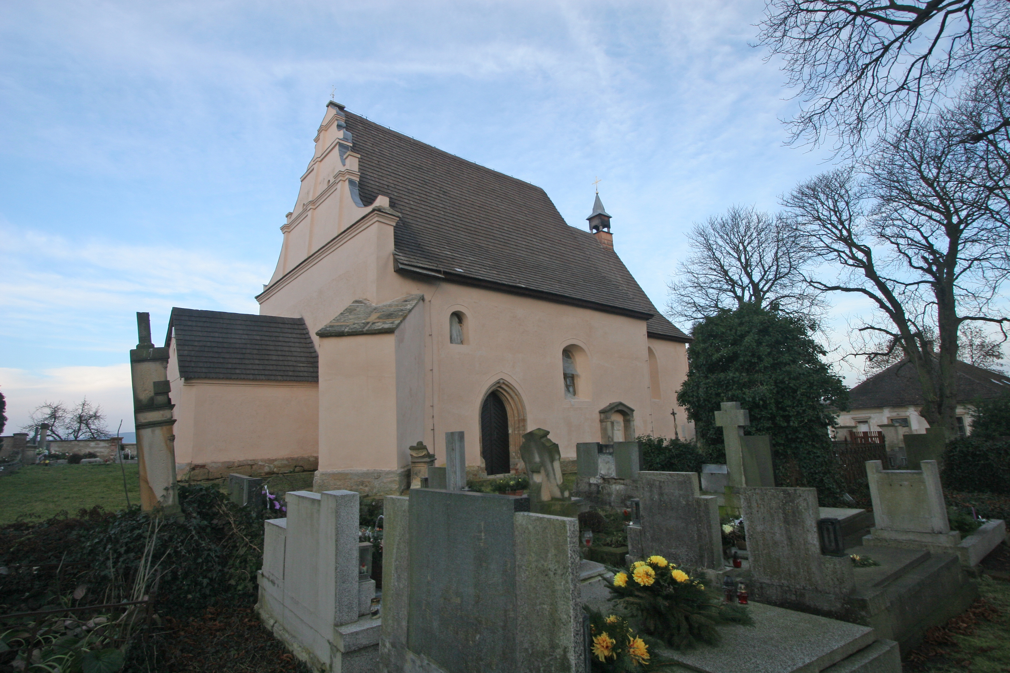 Kostel sv. Mikuláše (Lískovice), Lískovice